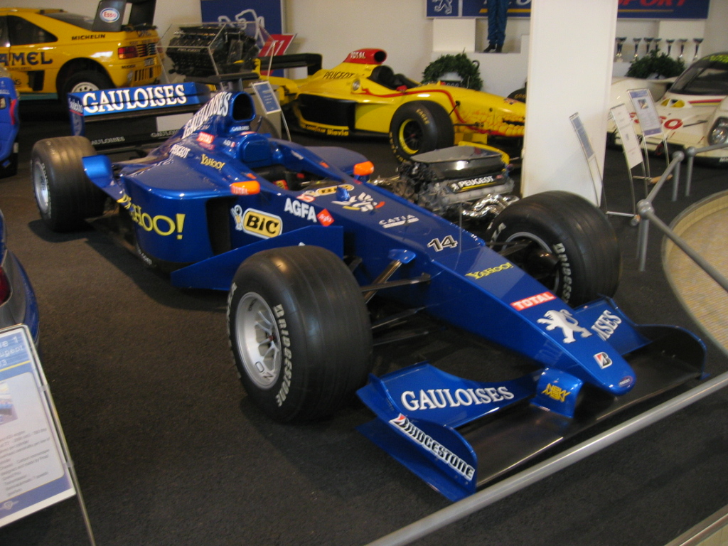 Formule 1 Prost Grand Prix - Musée Peugeot Sochaux